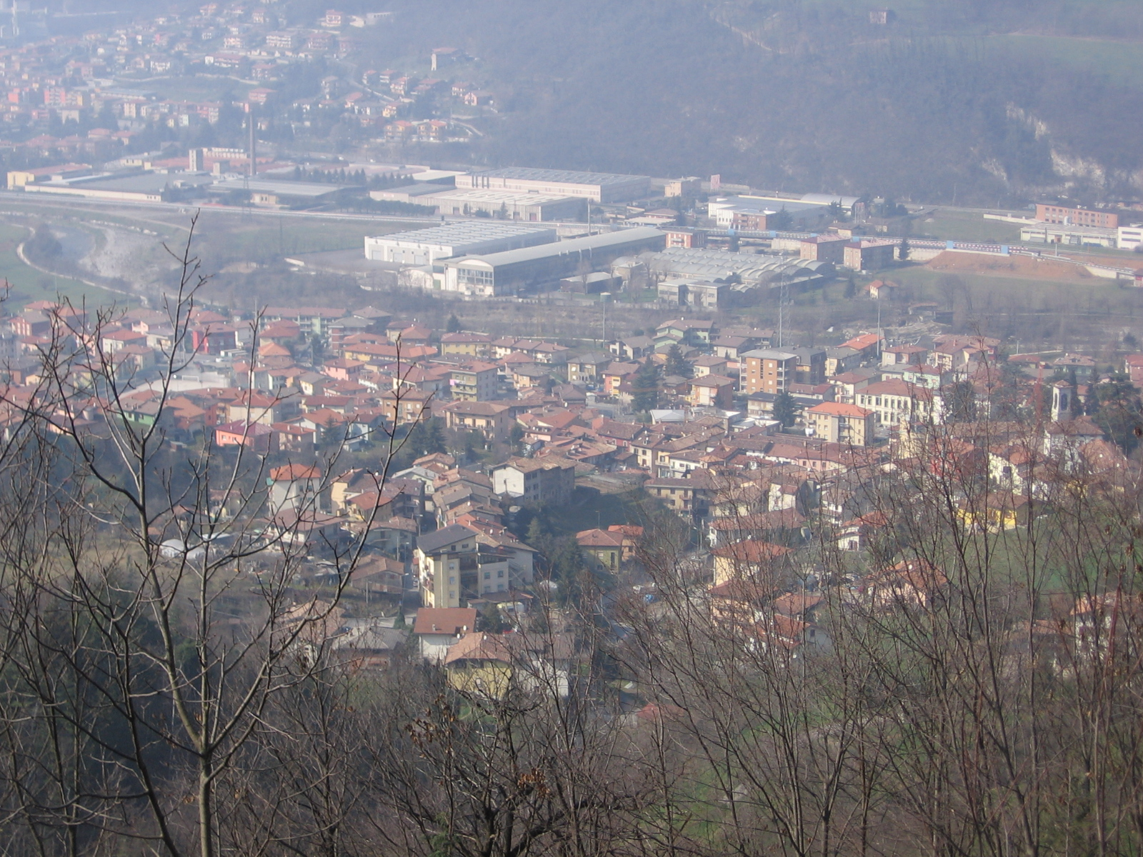 Pradalunga, Bergamo, Italy